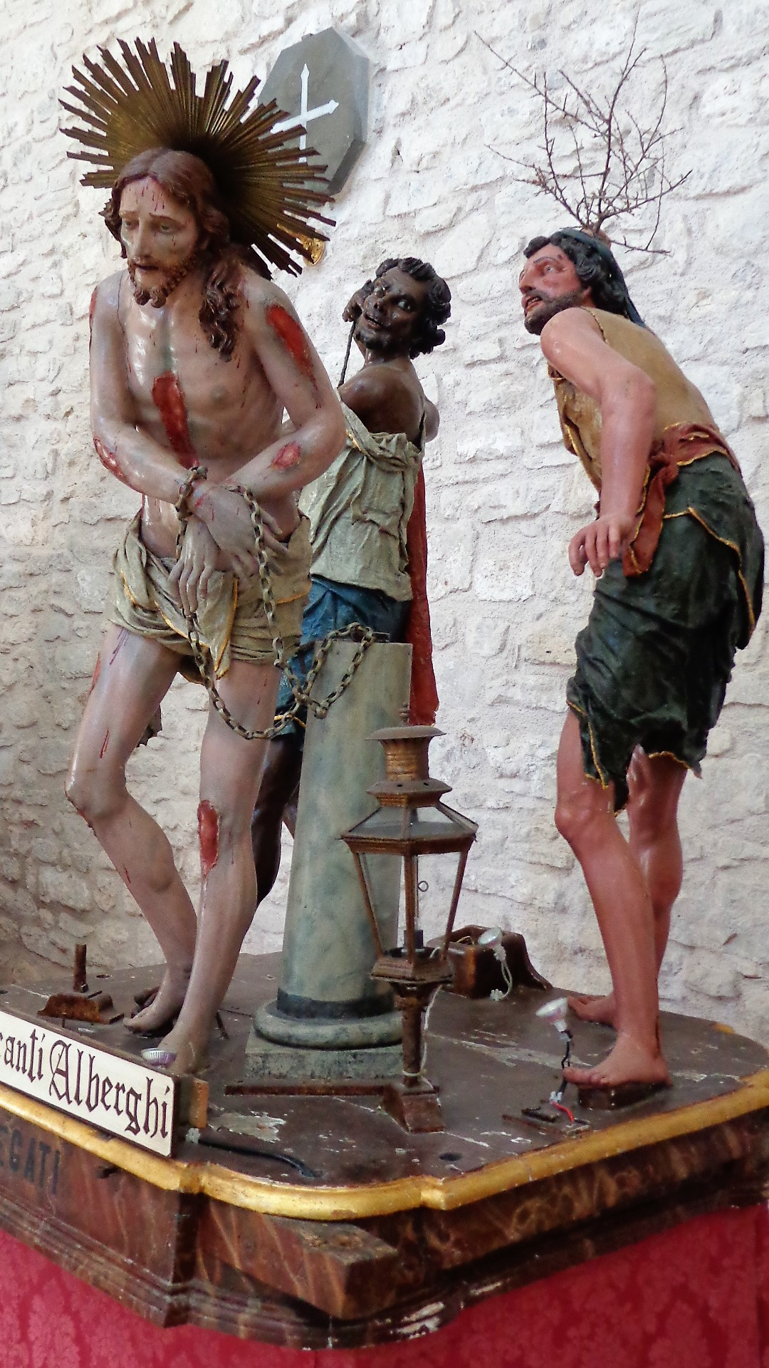 Misteri